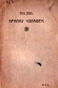 "Прапаў чалавек". Паэмы. Пецярбург: Друкарня А.Э. Коллінс.